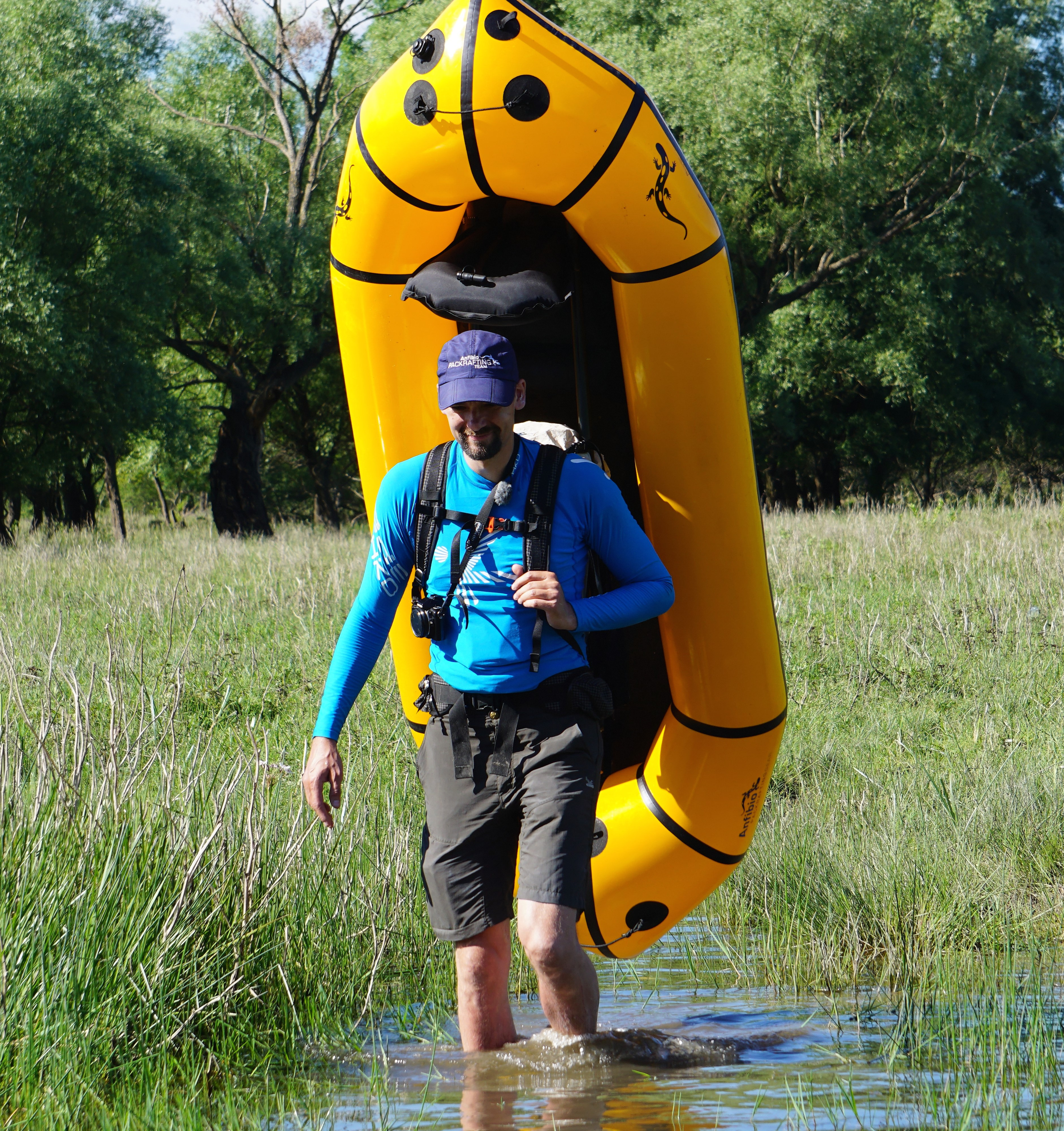 aufgebautes Packraft